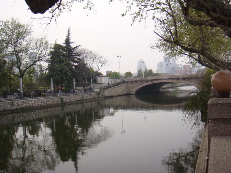 街景